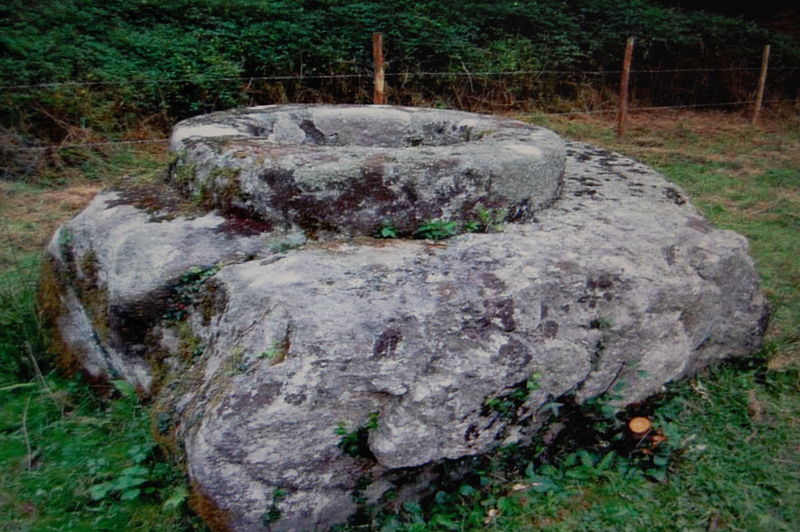 Desátková kamenná míra ve Francouzském Marval